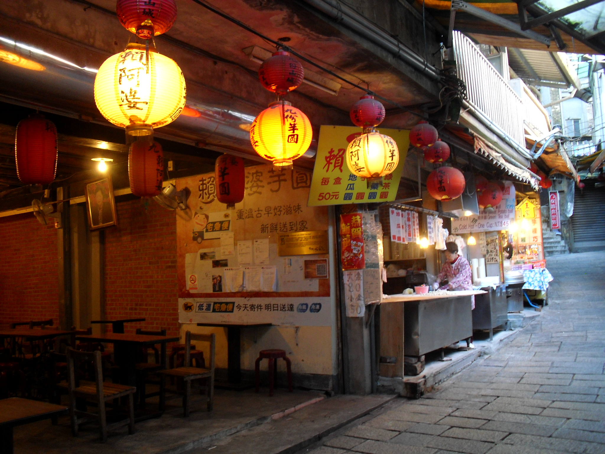 Bân-lâm-gú: 九份基山街賴阿婆芋圓店